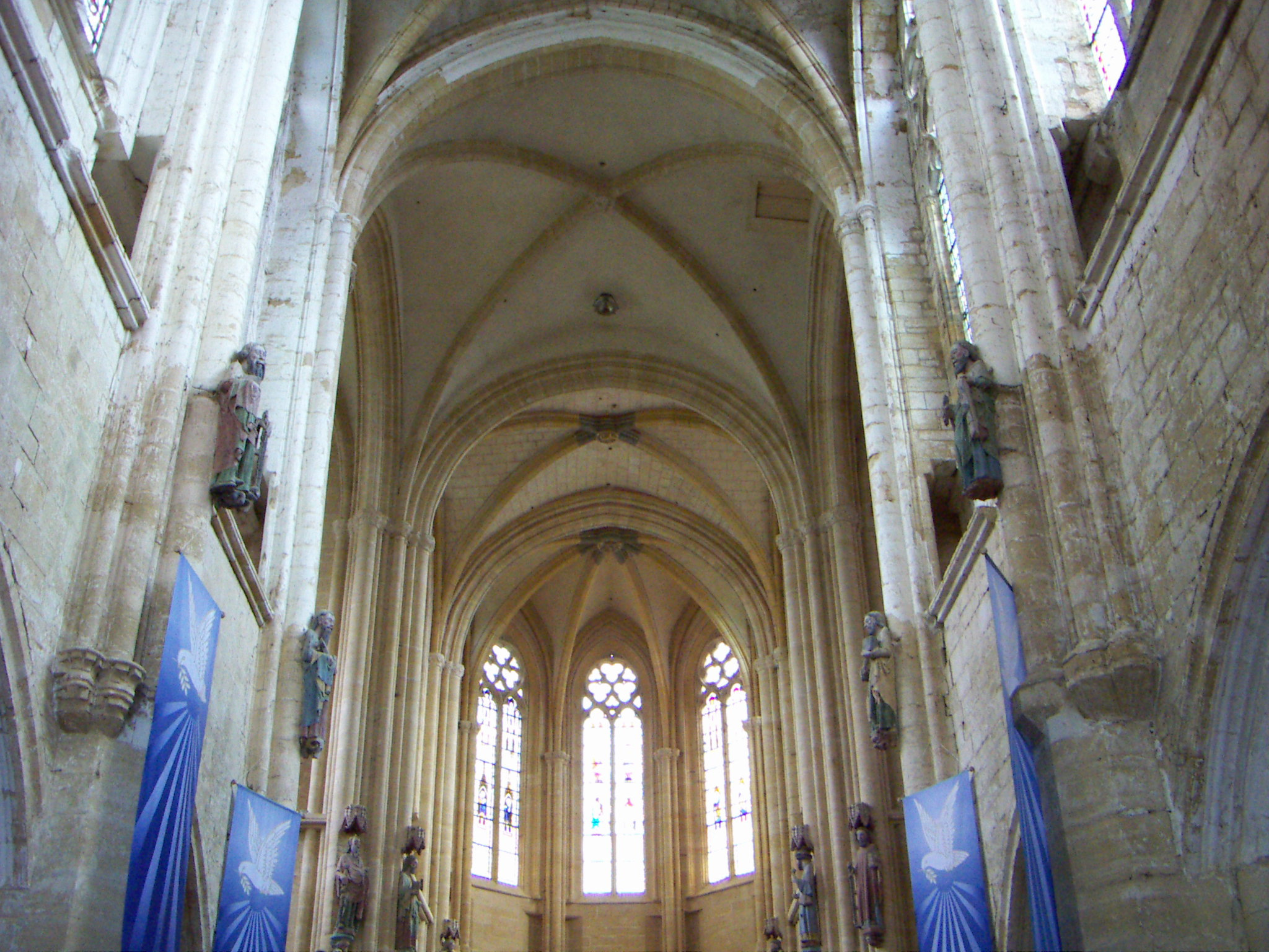 Basilique Notre-Dame d'Avioth, France, Meuse, interieur